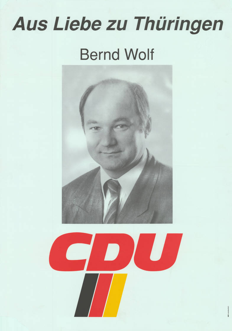 Aus Liebe zu Thüringen Bernd Wolf CDU Abbildung: Porträtfoto - Nationalfarben Plakatart: Kandidaten-/Personenplakat mit Porträt Objekt-Signatur: 10-037 : 10 Bestand: Landtagswahlplakate Thüringen ( 10-037) GliederungBestand10-18: Landtagswahlplakate Thüringen (10-037) » CDU Lizenz: KAS/ACDP 10-037 : 10 CC-BY-SA 3.0 DE